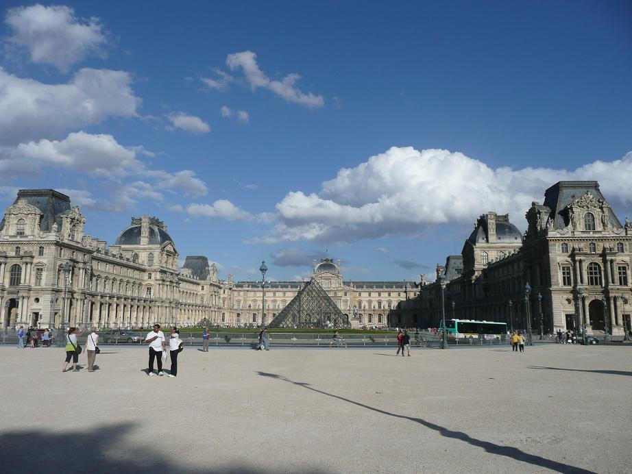 Place du Carrousel et cour Napoléon du palais du Louvre, Paris, France.